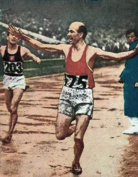 Gaston Reiff (1948, JO), 'Panini Olympia 1896 - 1972', Panini figurina n°142.